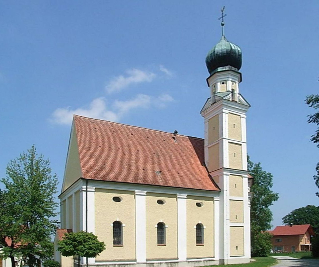 Wallfahrtskirche Langwinkl